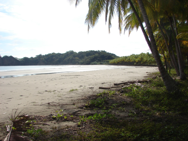 Playa Carrillo, Guanacaste, Costa Rica.